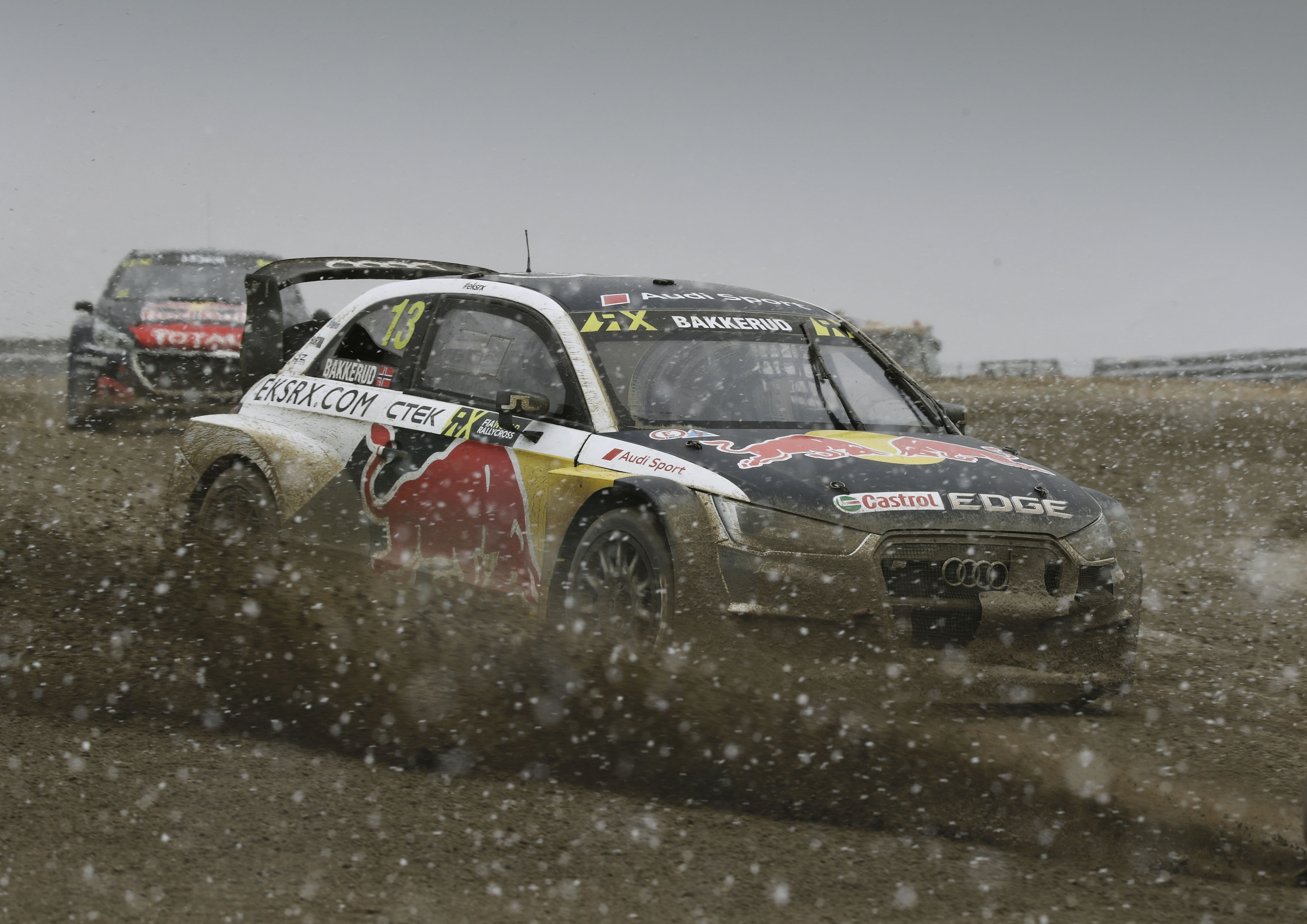 Audi S1 EKS RX quattro #13 (EKS Audi Sport), Andreas Bakkerud.